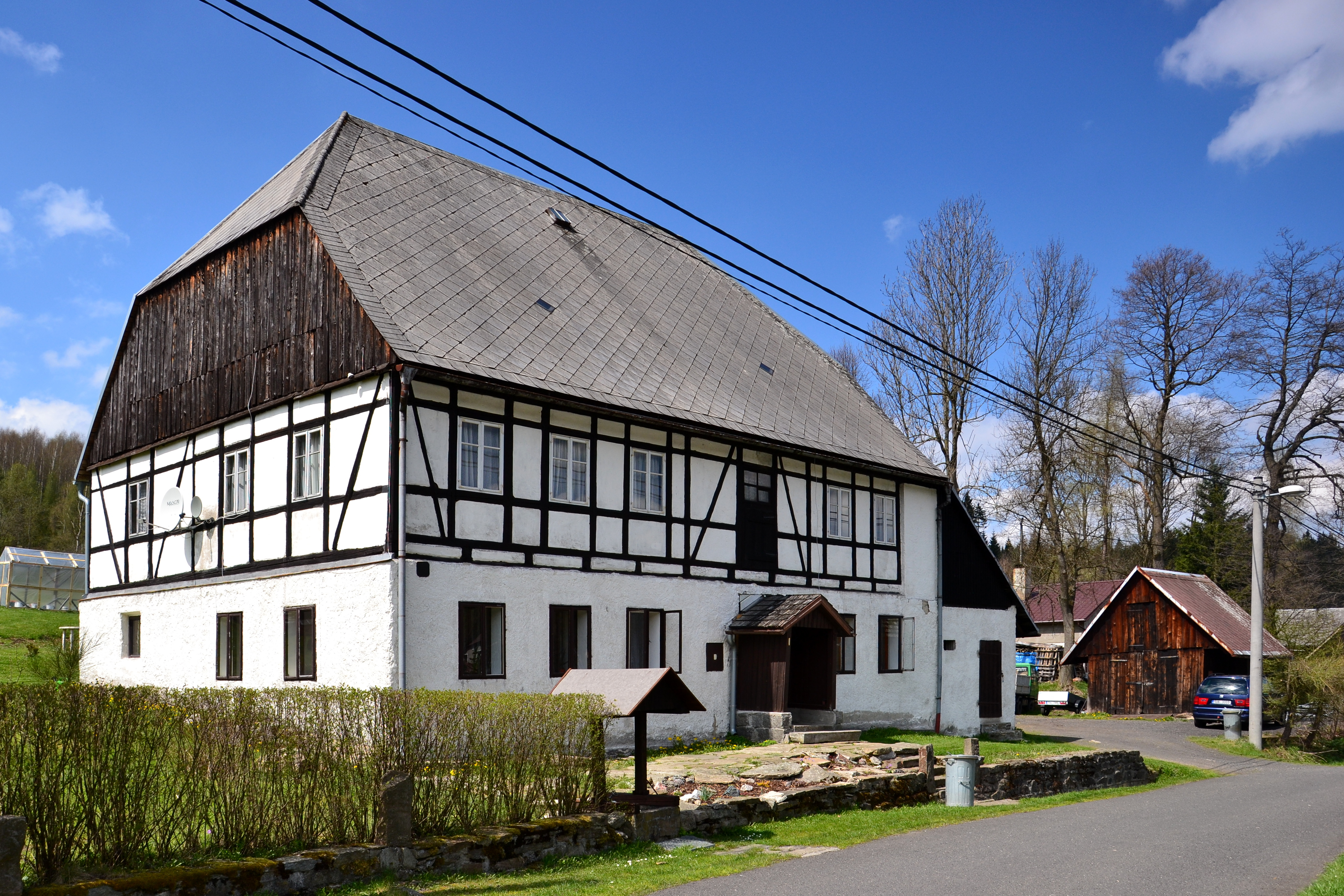 Usedlost čp. 7, Kryštofovy Hamry 7, Kryštofovy Hamry.